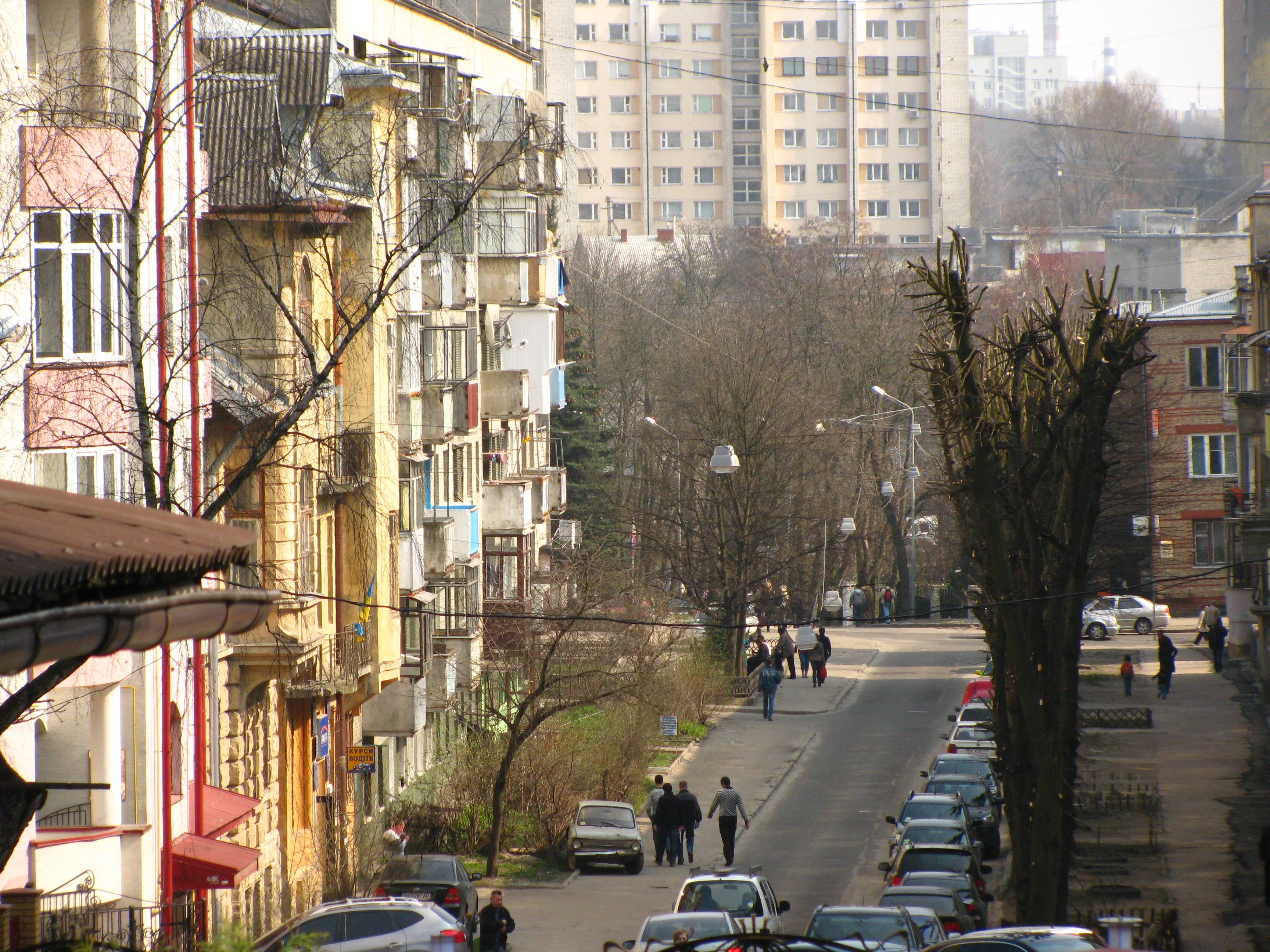 На Байках 2.jpg: Львів. вулиця Перемиська